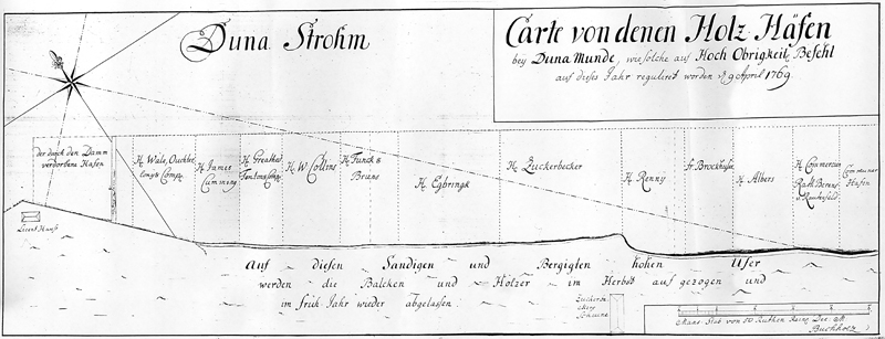 Bolderājas ostas piestātņu nomnieku teritoriālais plāns (LVVA, 2715. f., 1.apr., 239. lieta)